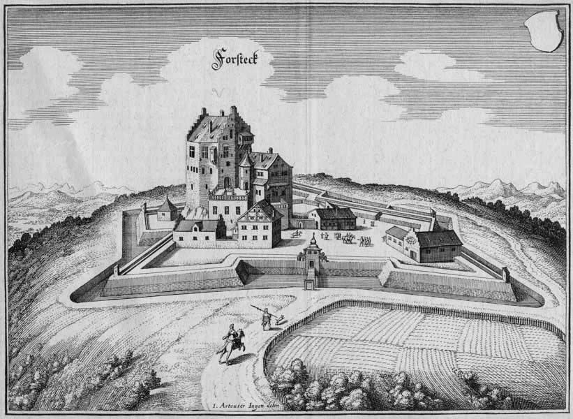 Der Zürcher Landvogteisitz Schloss Forstegg in der Herrschaft Hohensax nach dem Ausbau von 1622-27.